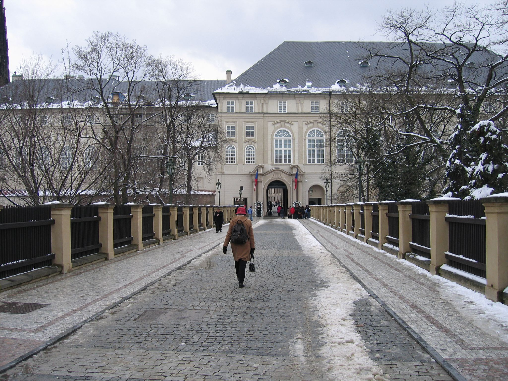 Pražský hrad, Prašný most